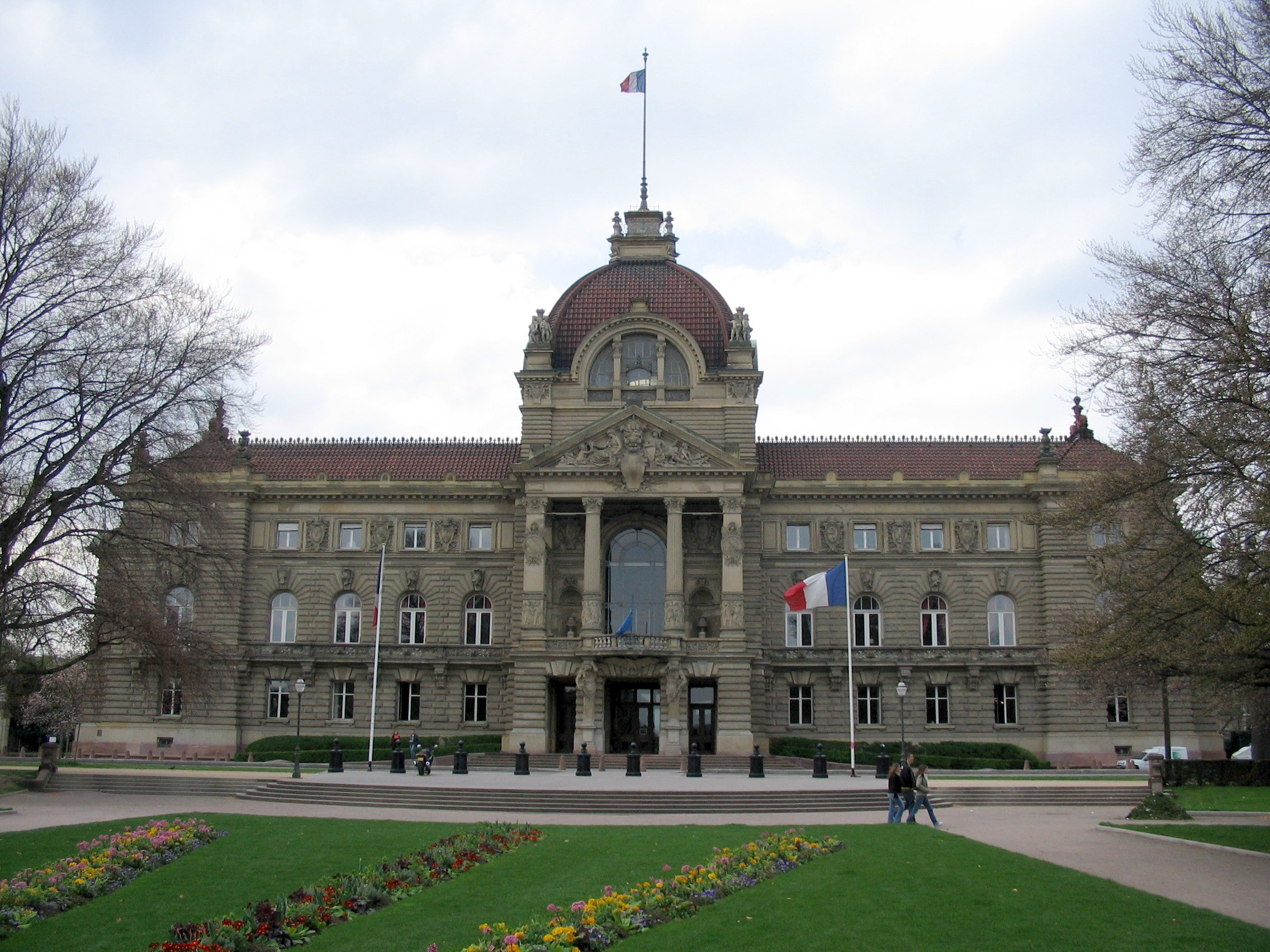 Le Palais du Rhin, fin 19e siècle, sur la place de la République à Strasbourg.